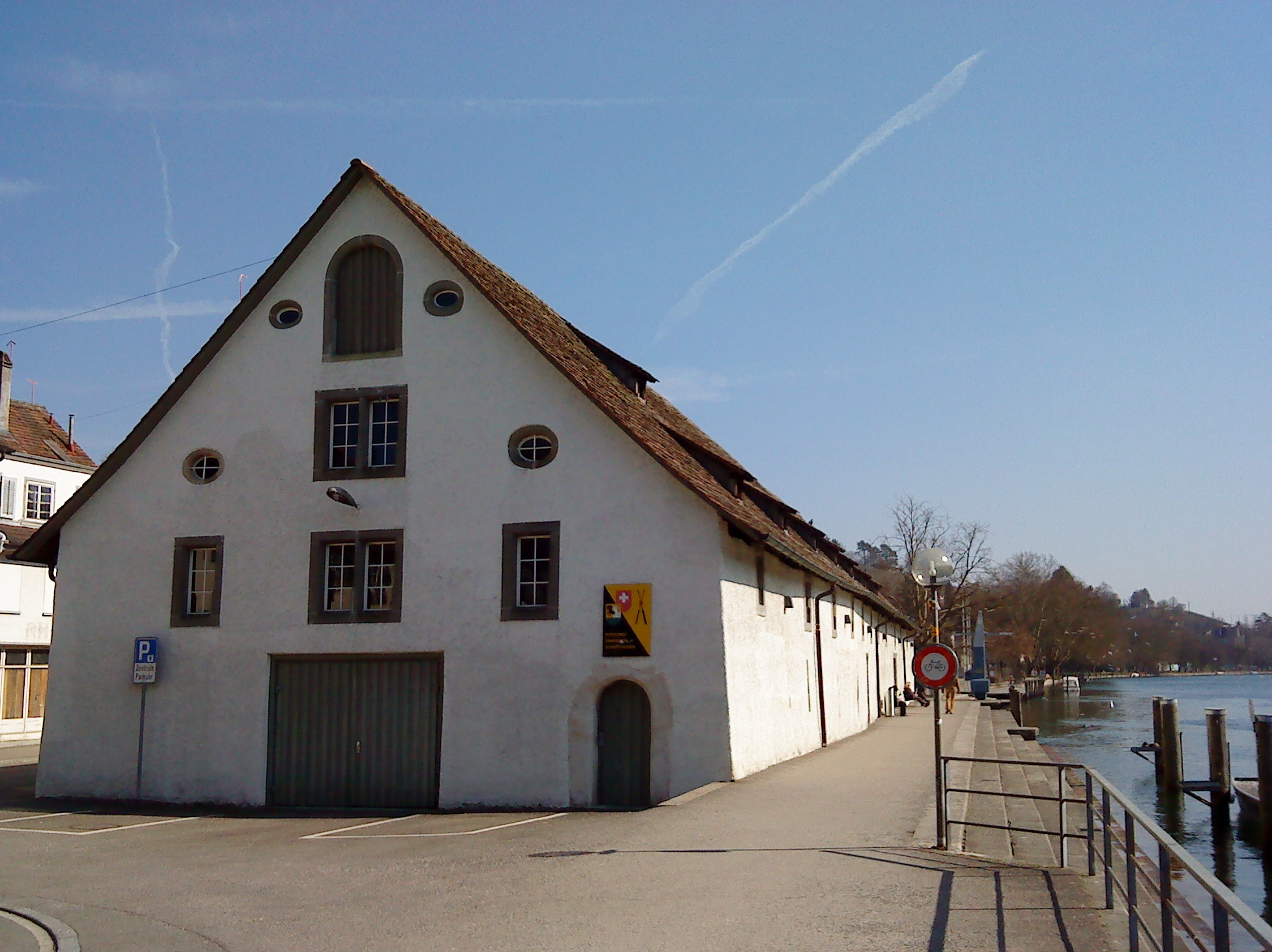 Westansicht des historischen Salzstadels in Schaffhausen/CH.